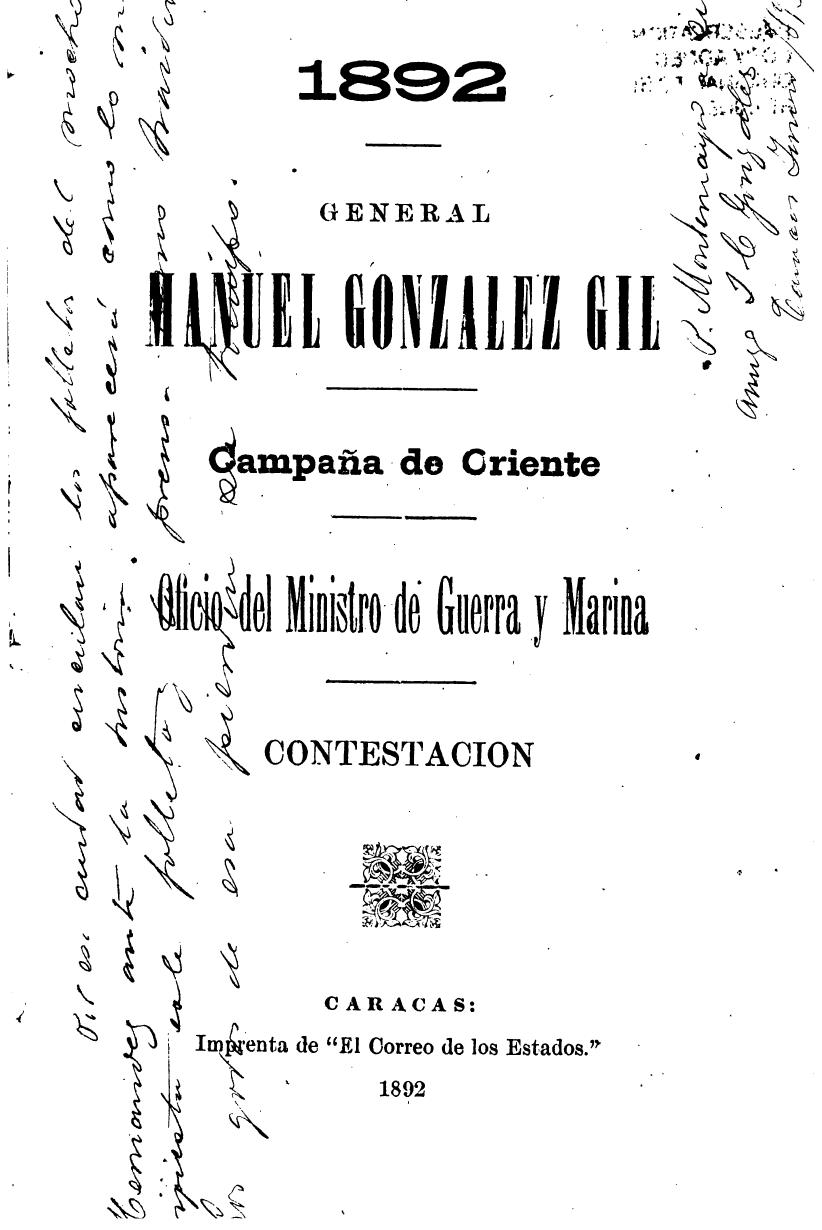 Portada original de la publicación sobre el parte de La Campaña de Oriente por Manuel González Gil publicada en 1892 por la imprenta "El Correo del Estado" a petción del Ministerio de Guerra y Marina de los Estados Unidos de Venezuela